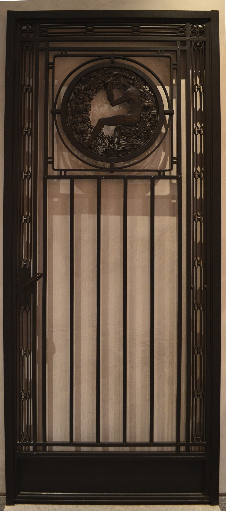 Porte en fer forgé réalisée par l'artisan ferronnier Charles Piguet (Bière, Suisse, 1887 - Lyon 1942) acquise en 1919